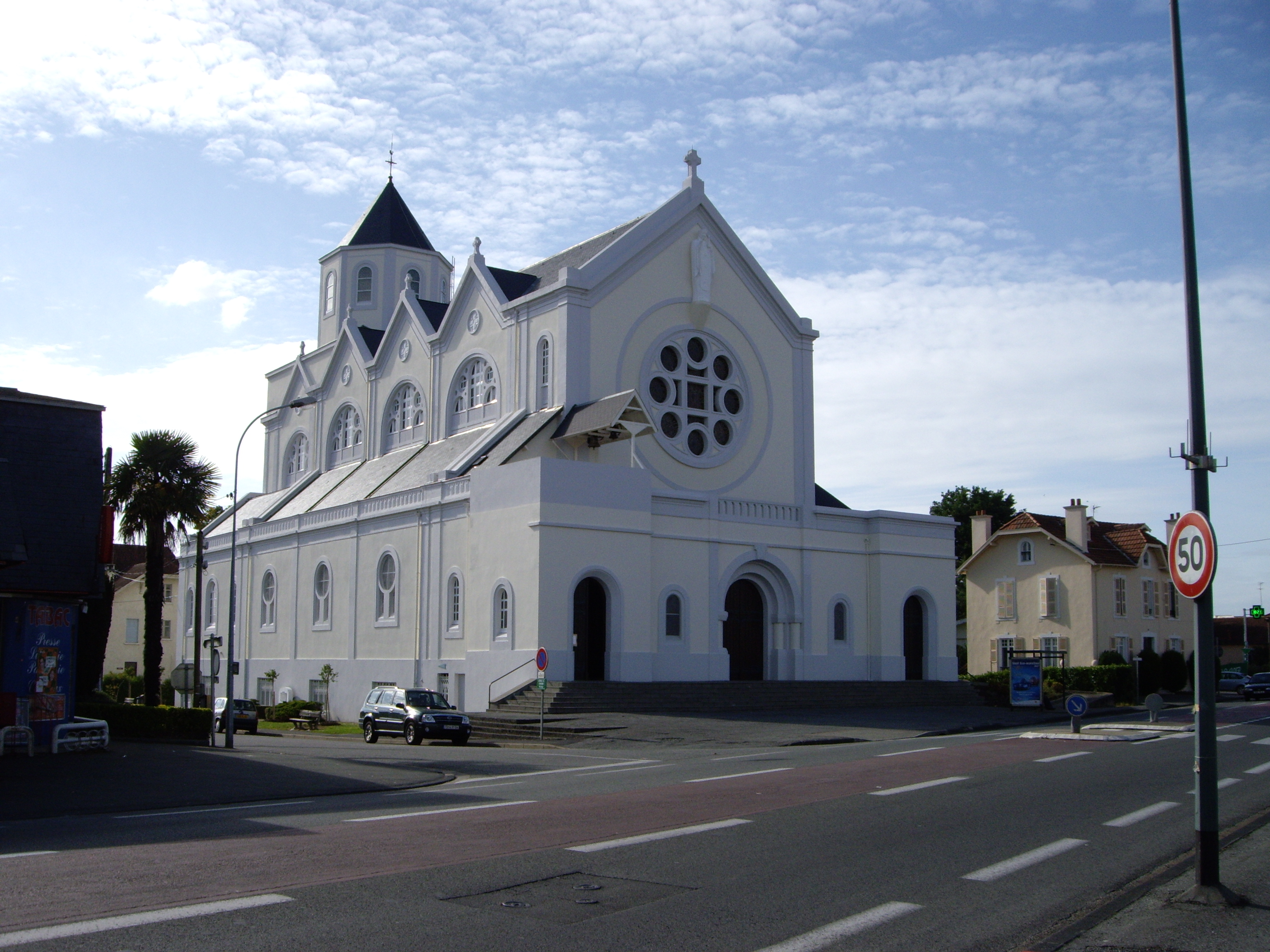 Église Saint-Julien de Lons (Lons, 64)